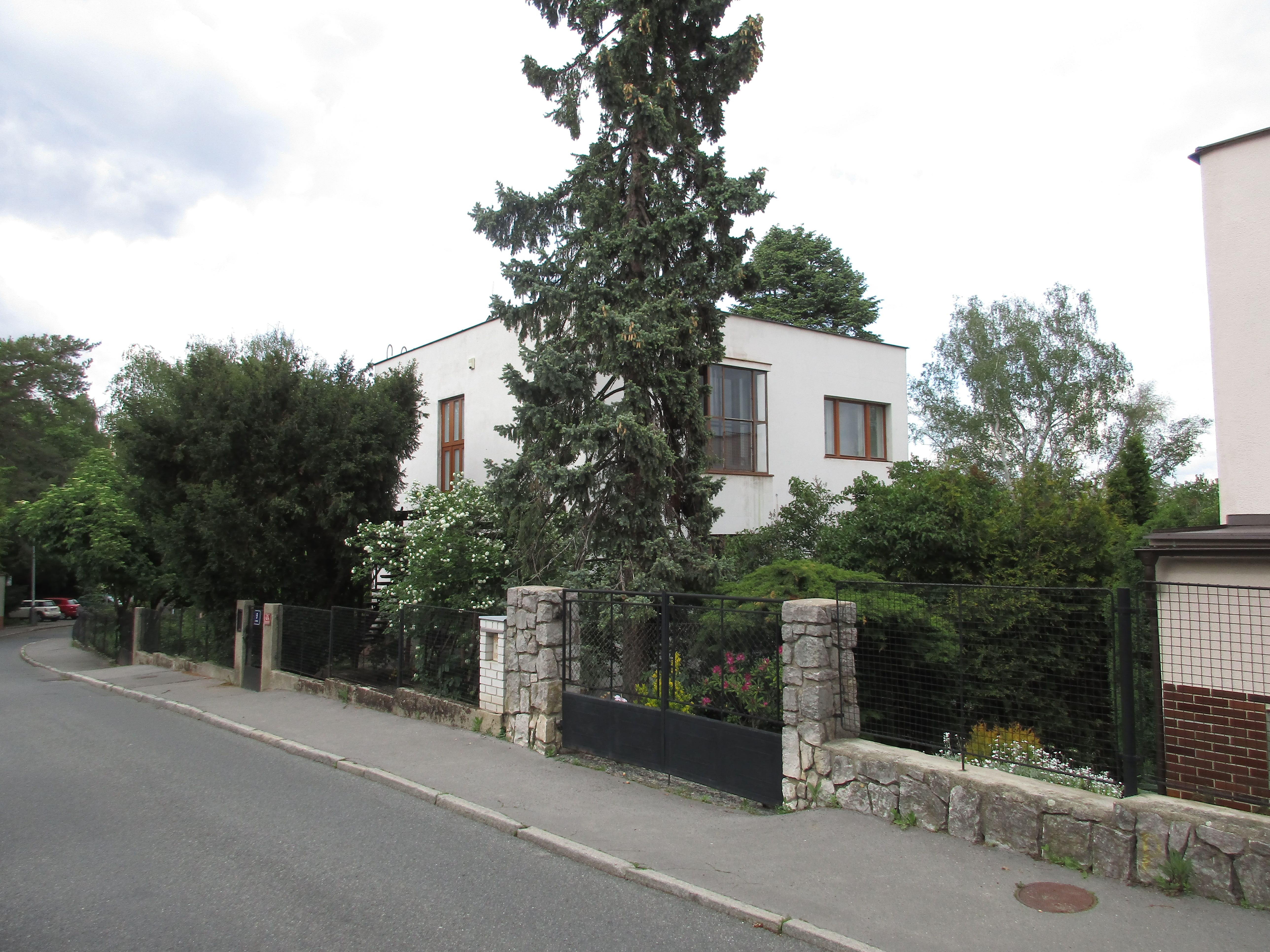 Filmařská 404/9, Praha 5-Hlubočepy